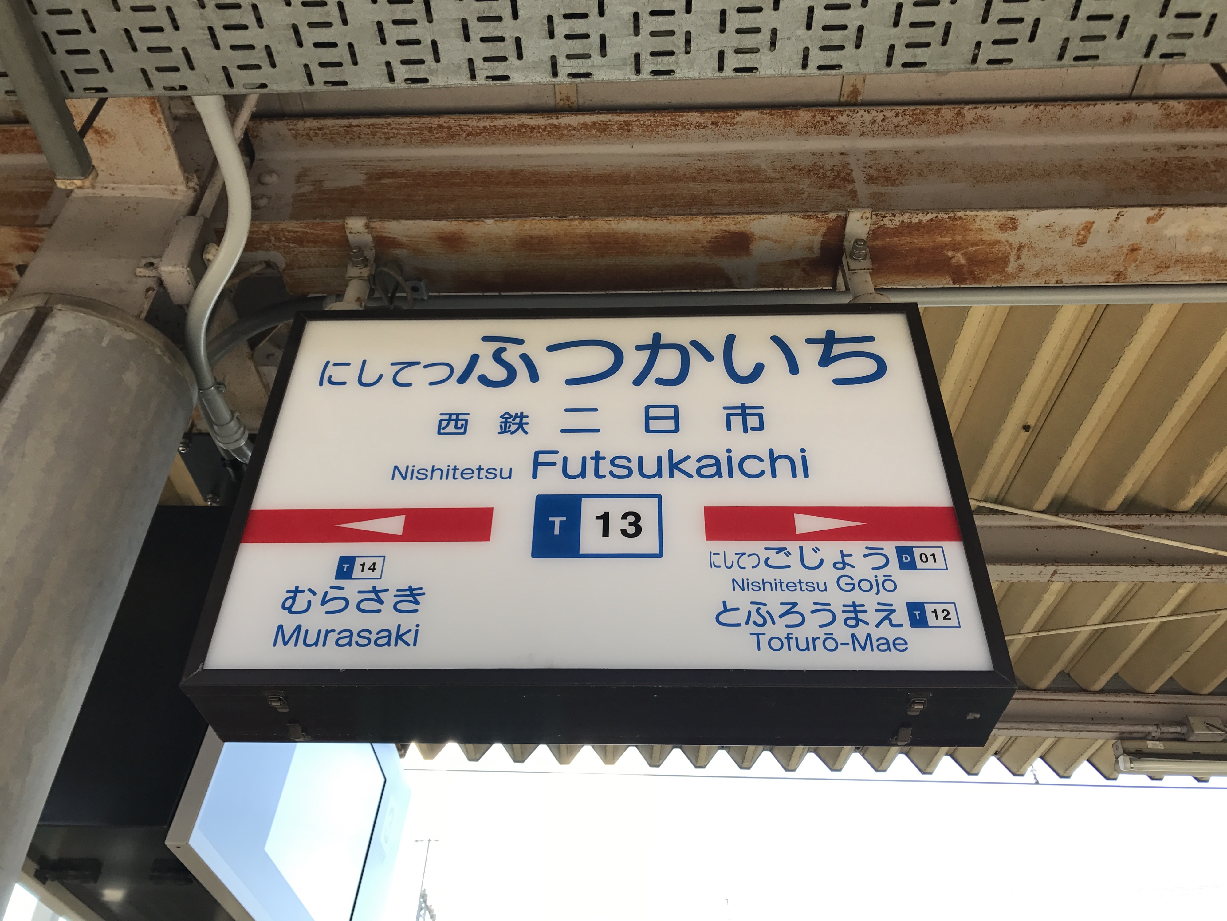 西鉄二日市駅の駅名標